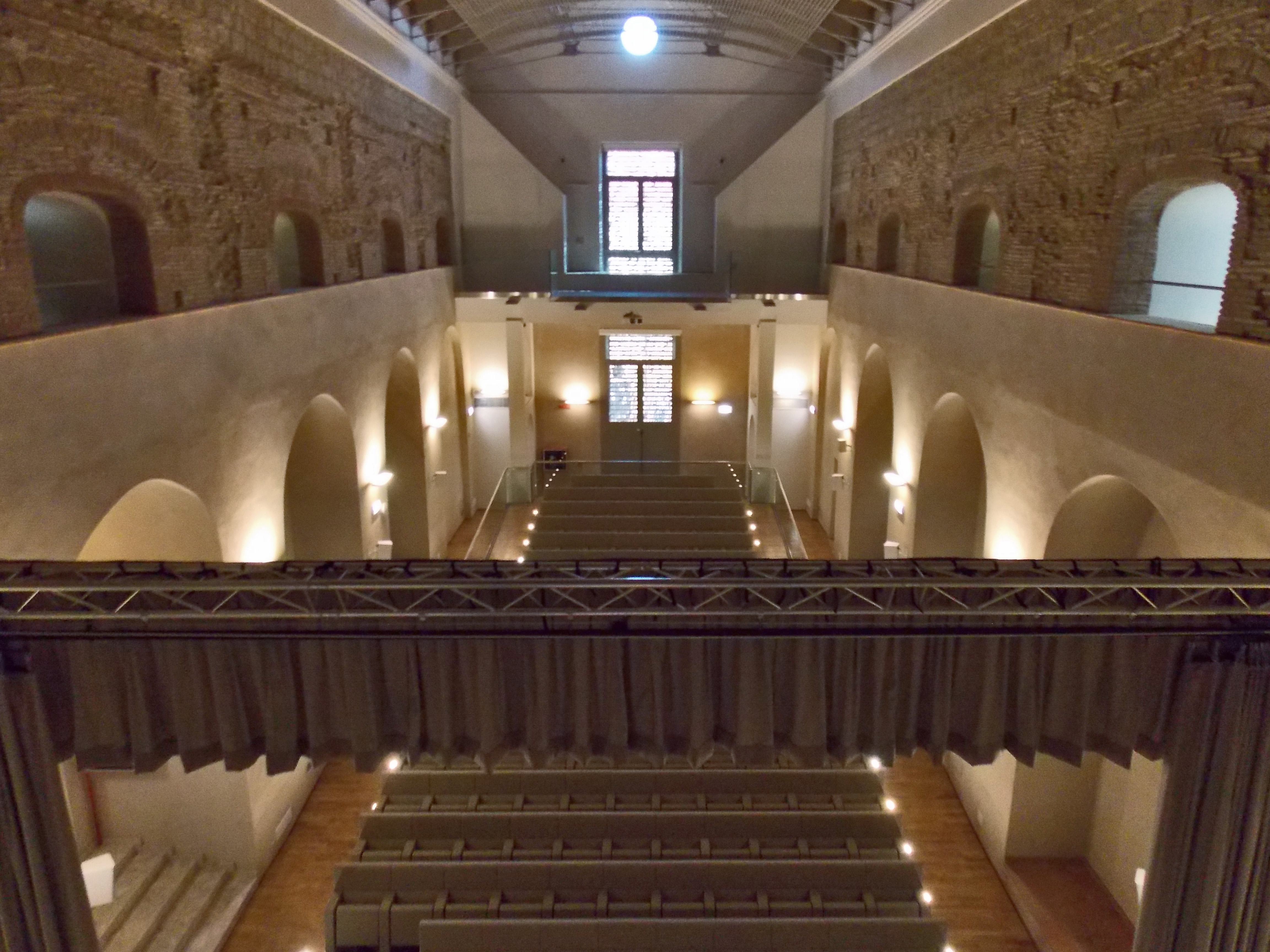 L'ex monastero benedettino di San Vittorino a Benevento. La zona recuperata per il Conservatorio Statale di Musica Nicola Sala